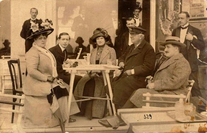 Blaha Lujza egy fiumei vendéglő teraszán Solti Dezsővel, Solti Herminnel, Újházi Edével és ismeretlennel.